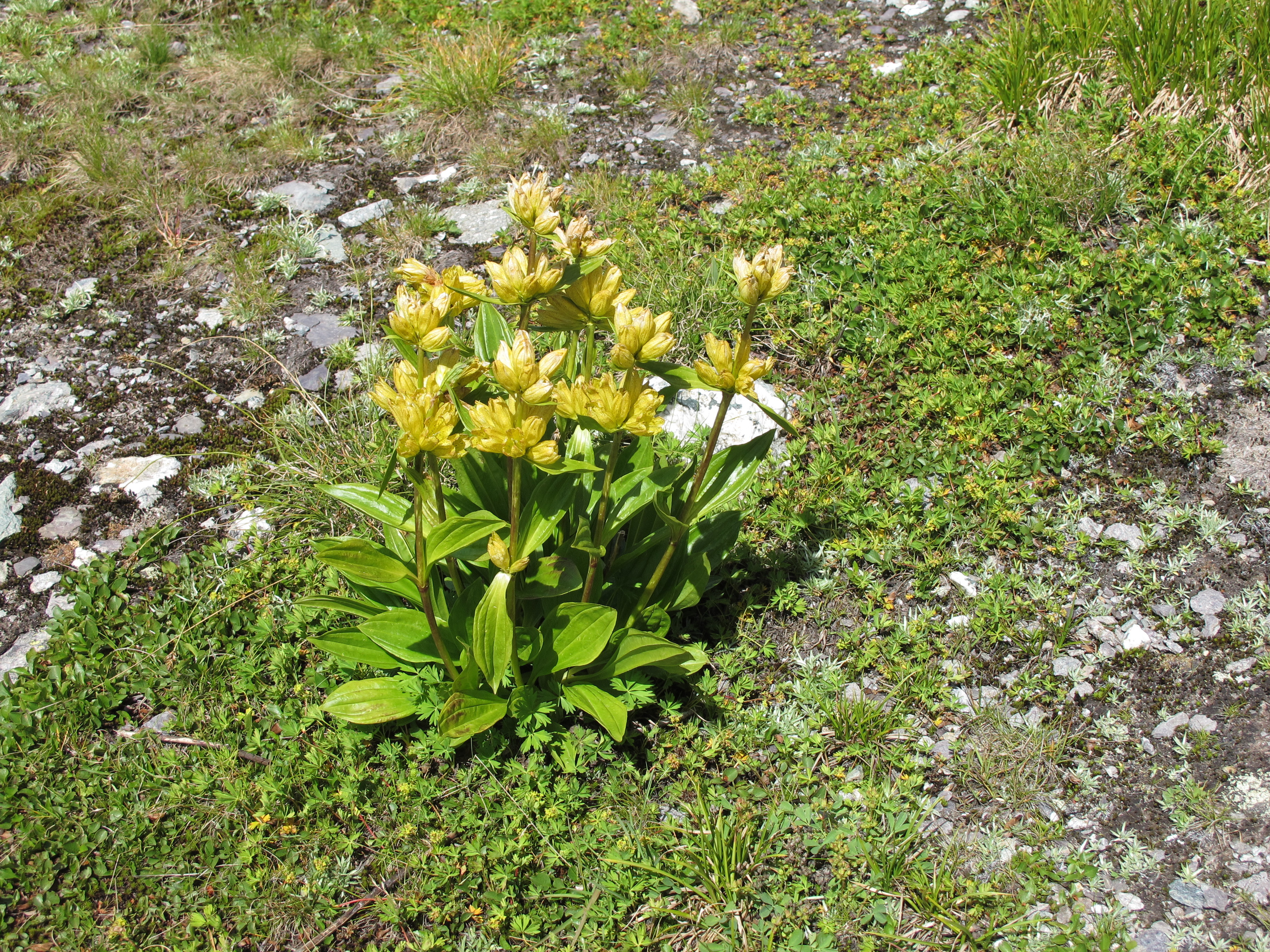 Gentiana punctata